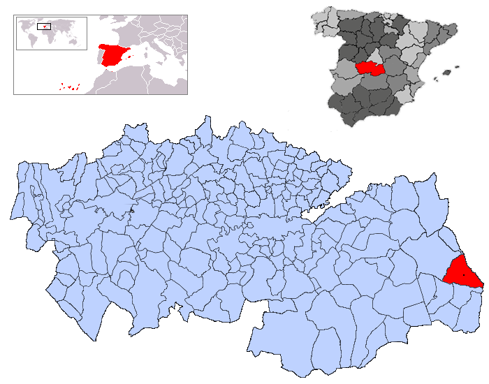 Villanueva de Alcardete en la provincia de Toledo